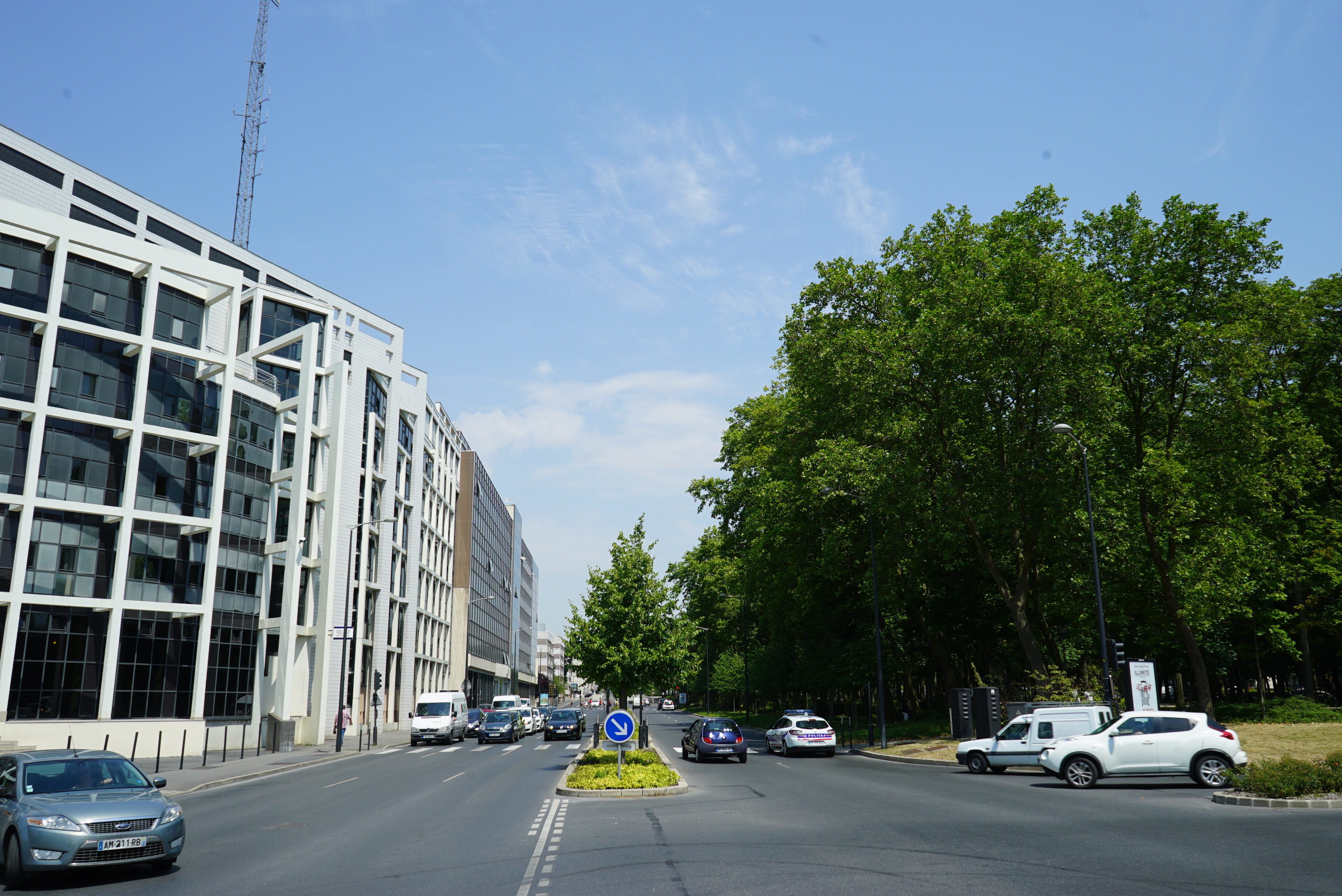 boulevard Louis-Roederer, hôtel de police, basses promenades à Reims